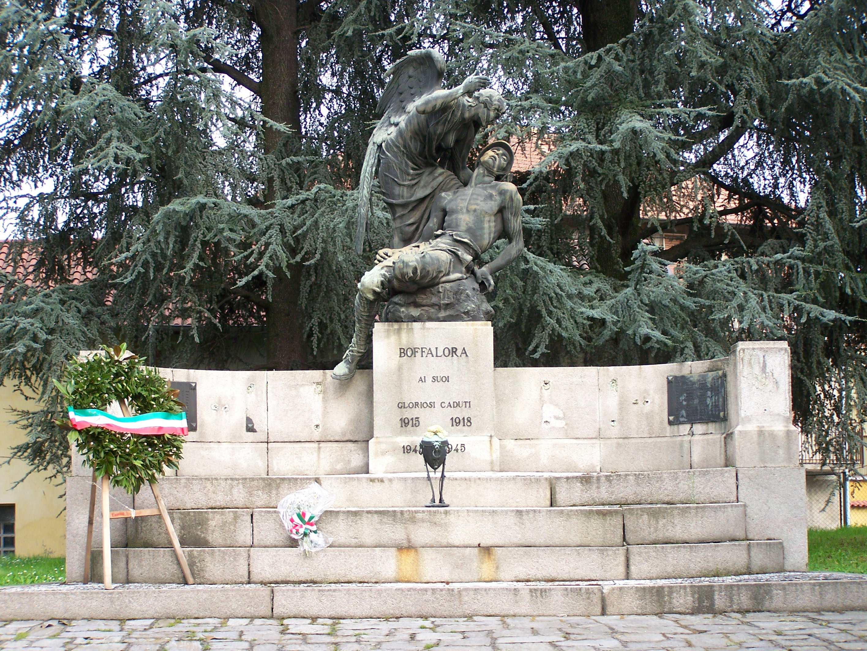 Monumento ai caduti ad opera di Nicola Fiore, Boffalora sopra Ticino (MI) - Italia